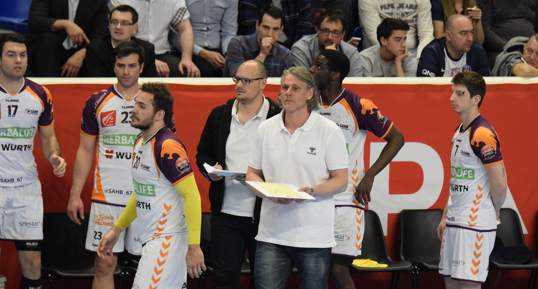 Rencontre de la 20e journée de LNh entre le PSG Handball et Sélestat. A Coubertin, le 08 avril 2015.